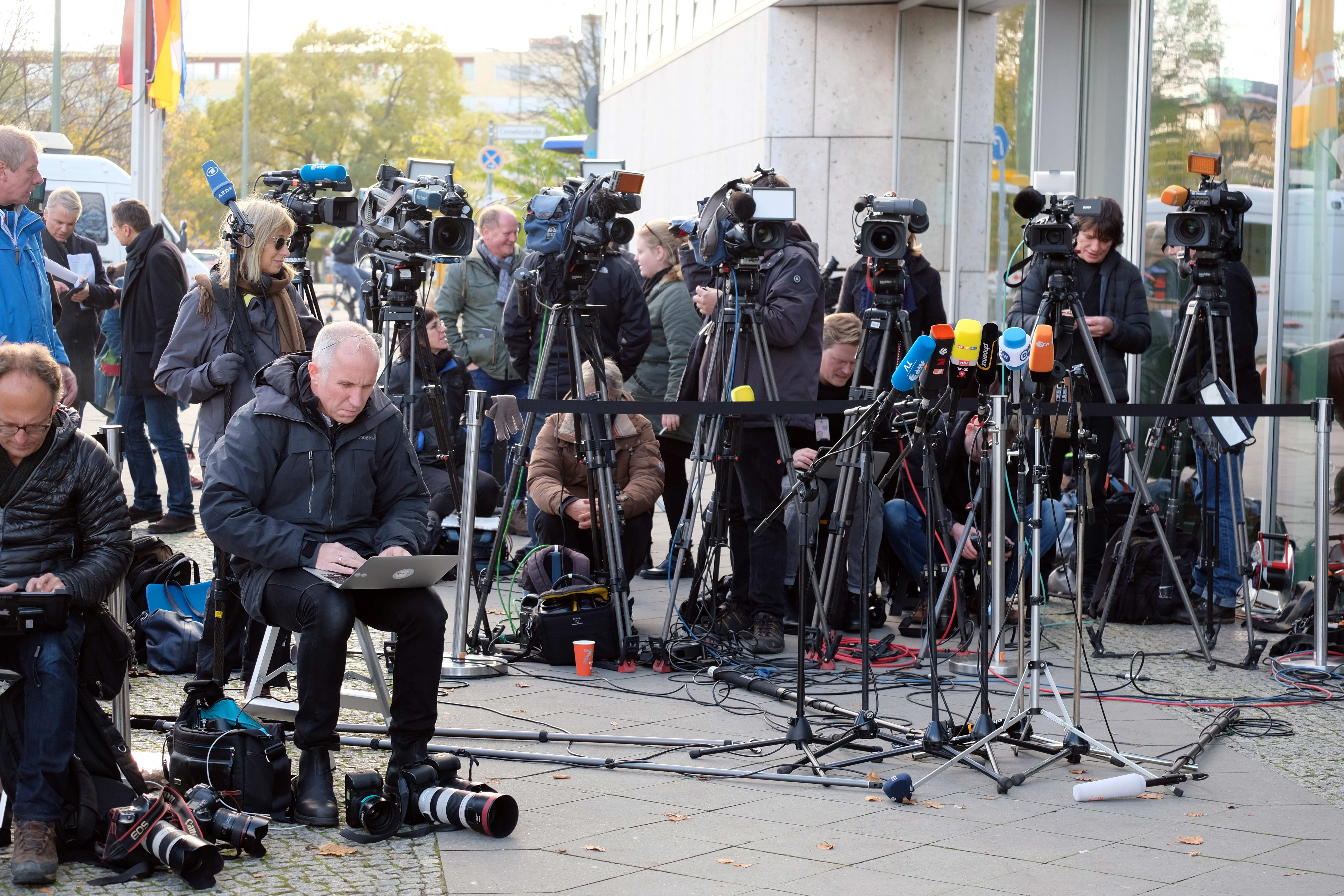 Medienvertreter warten vor dem Konrad Adenauer Haus in Berlin auf eine Pressestatement zum Ausgang der Jamikaverhandlungen, Nov. 2017